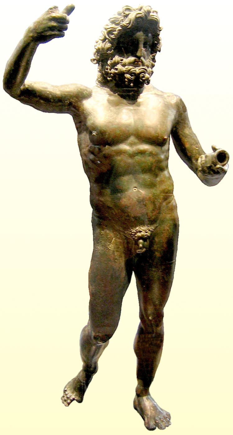 Statue en bronze du Jupiter Stator, Ier siècle, retrouvé au Vieil-Évreux, conservé au musée d'Évreux